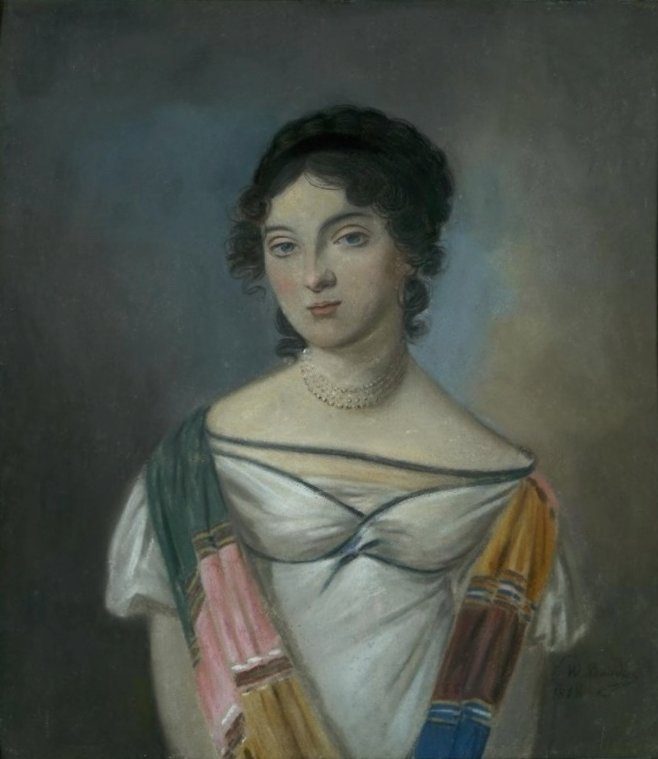 Варвара Дмитриевна Сухтелен, ур. графиня Зубова (1799—после 1833).